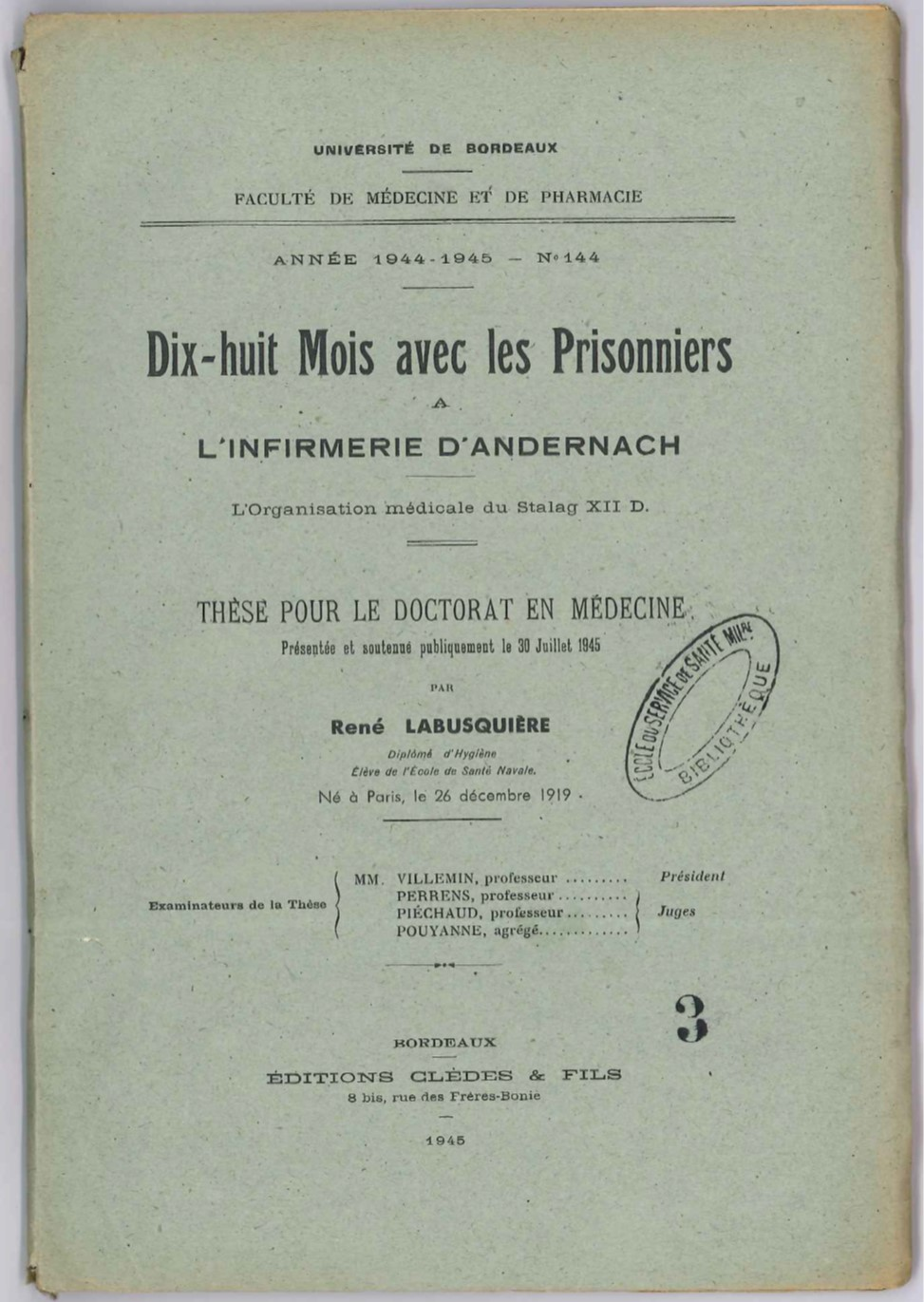 Couverture de la thèse de doctorat de médecine de René Labusquière. 1945